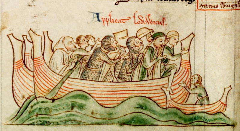 Návrat Ludvika VIII. z Anglie